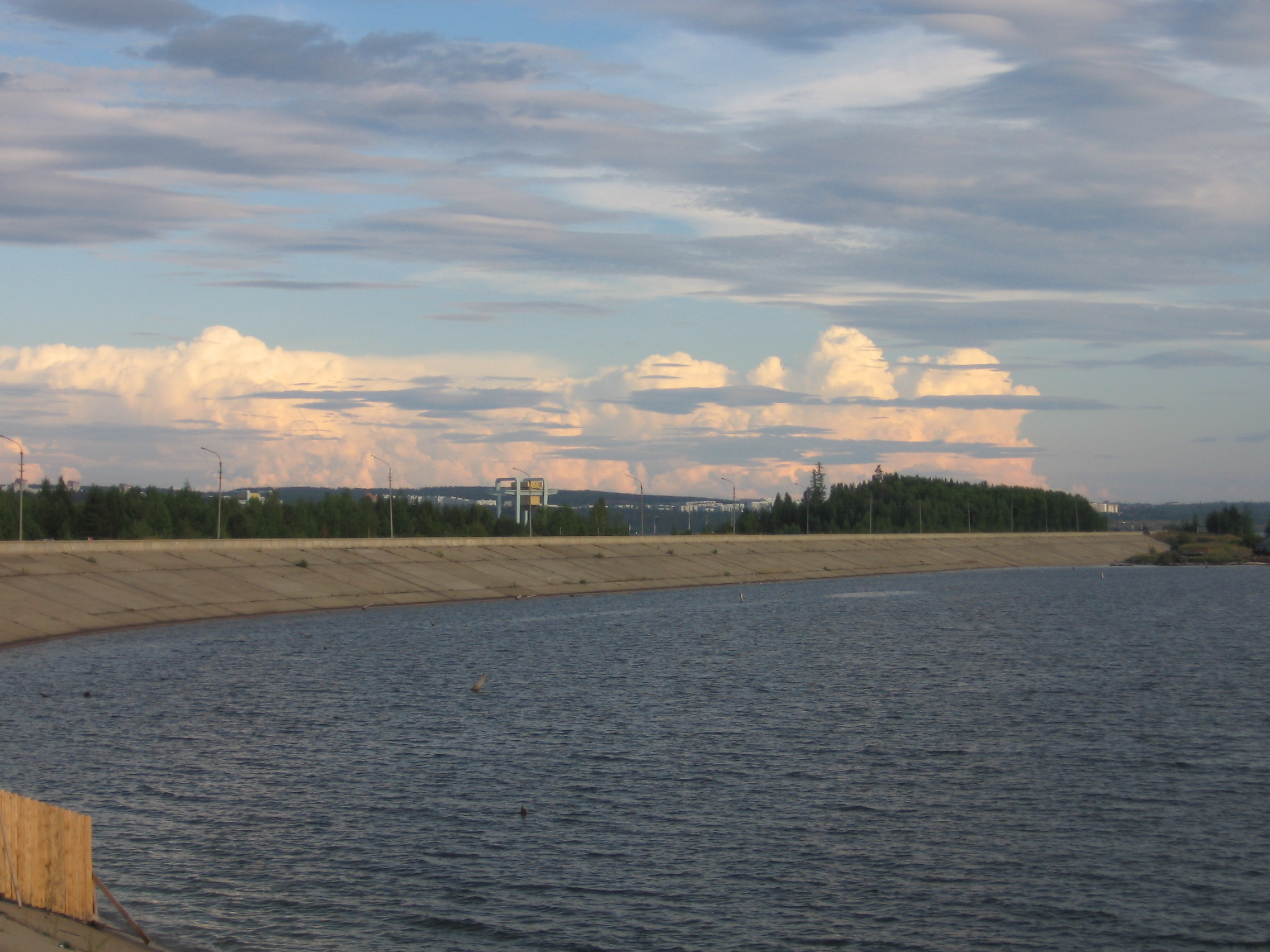 Усть-Илимское водохранилище